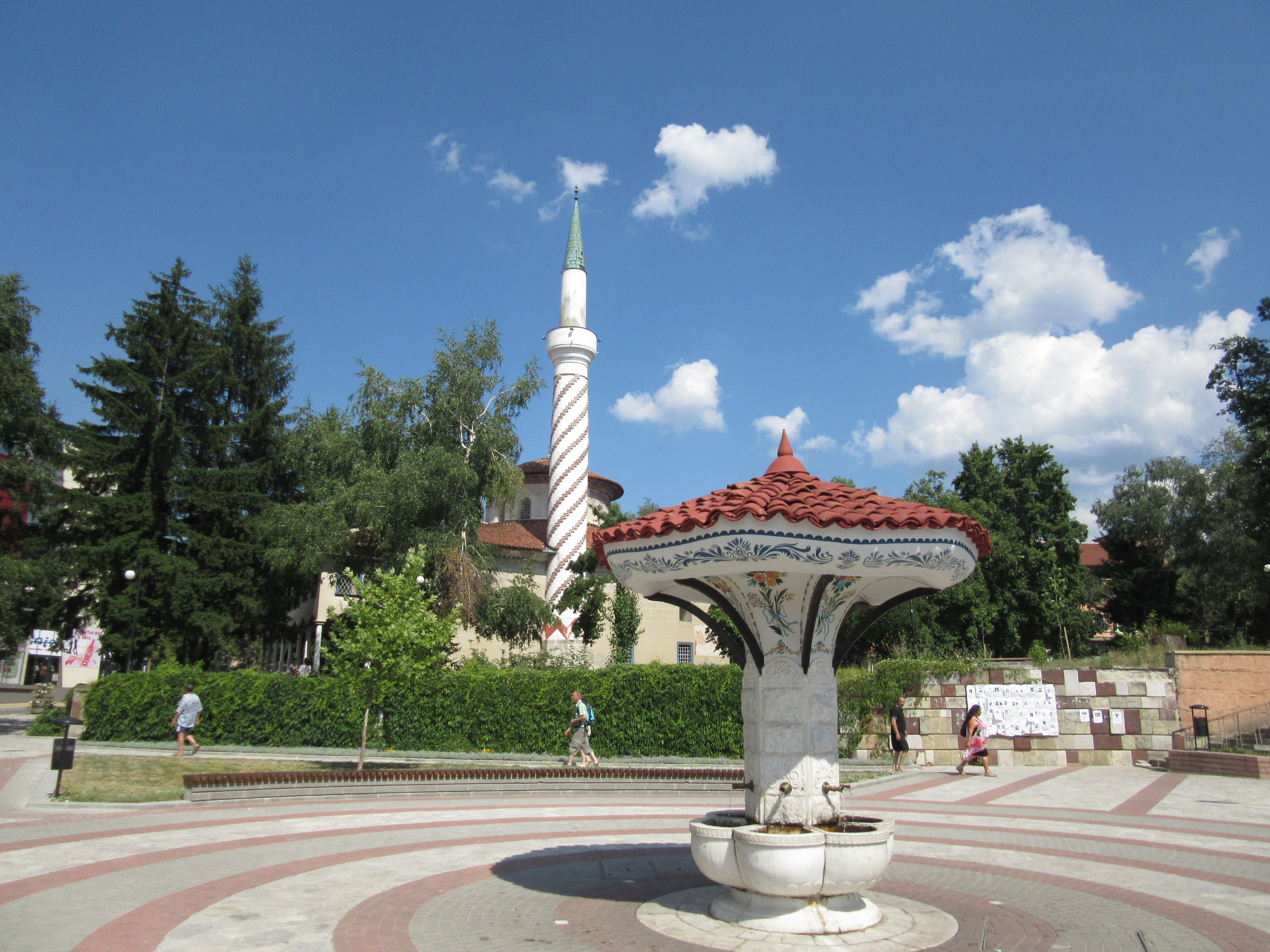 Чадър чешма/ Шарената чешма, Самоков на фона на Байракли джамия